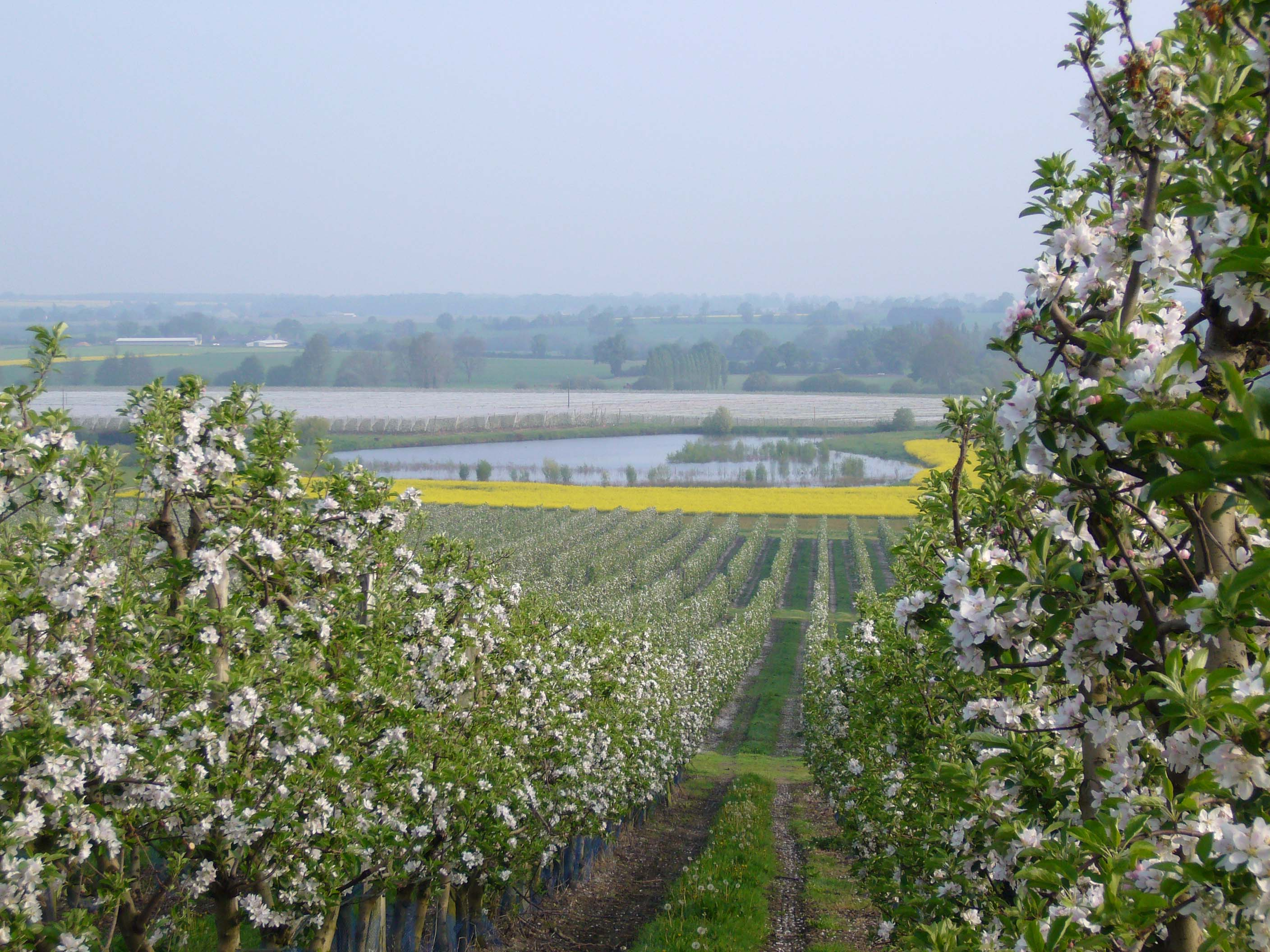 Vergers de Pommiers HoneyCrunch en floraison